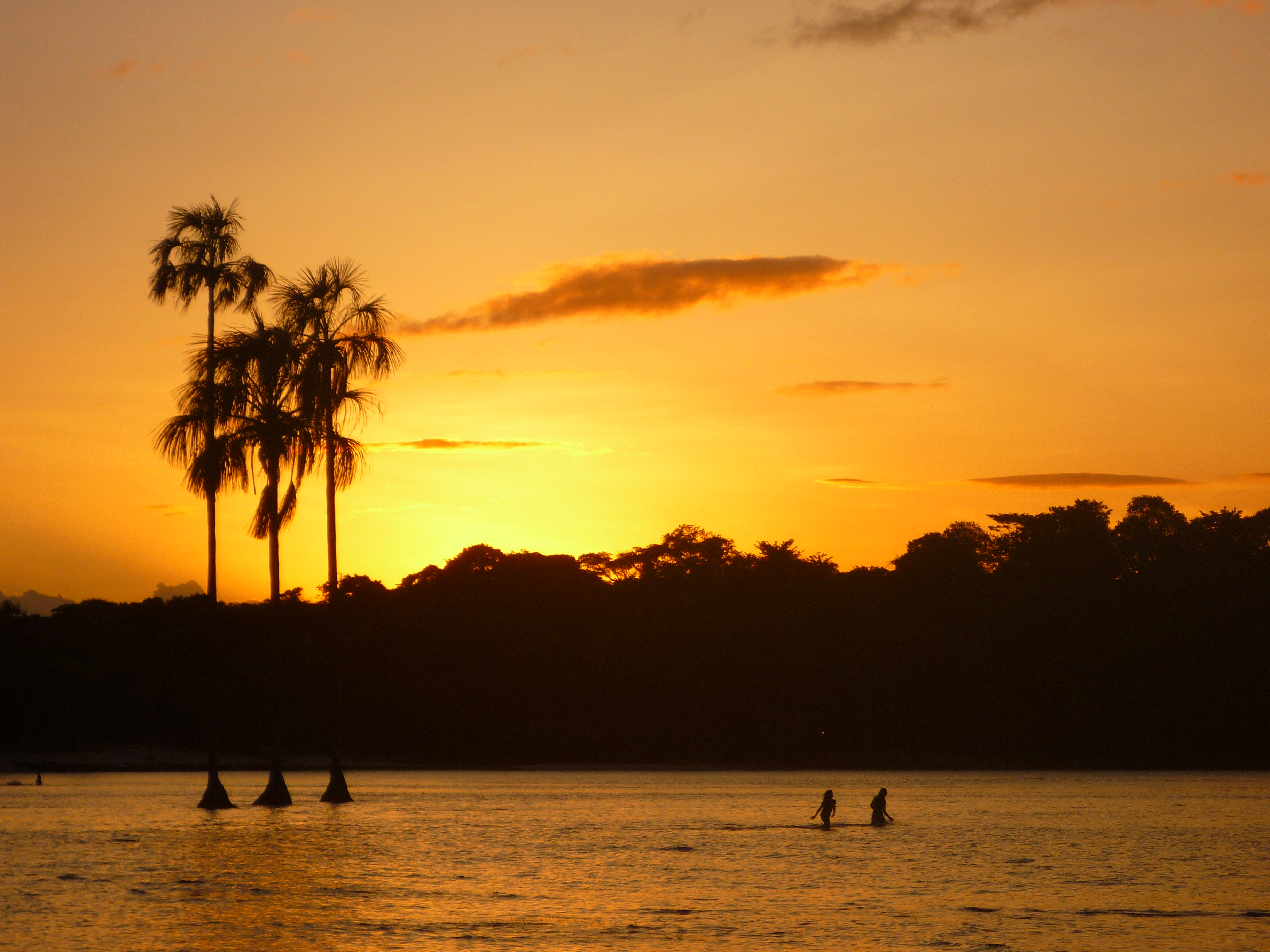 Parque Nacional Canaima